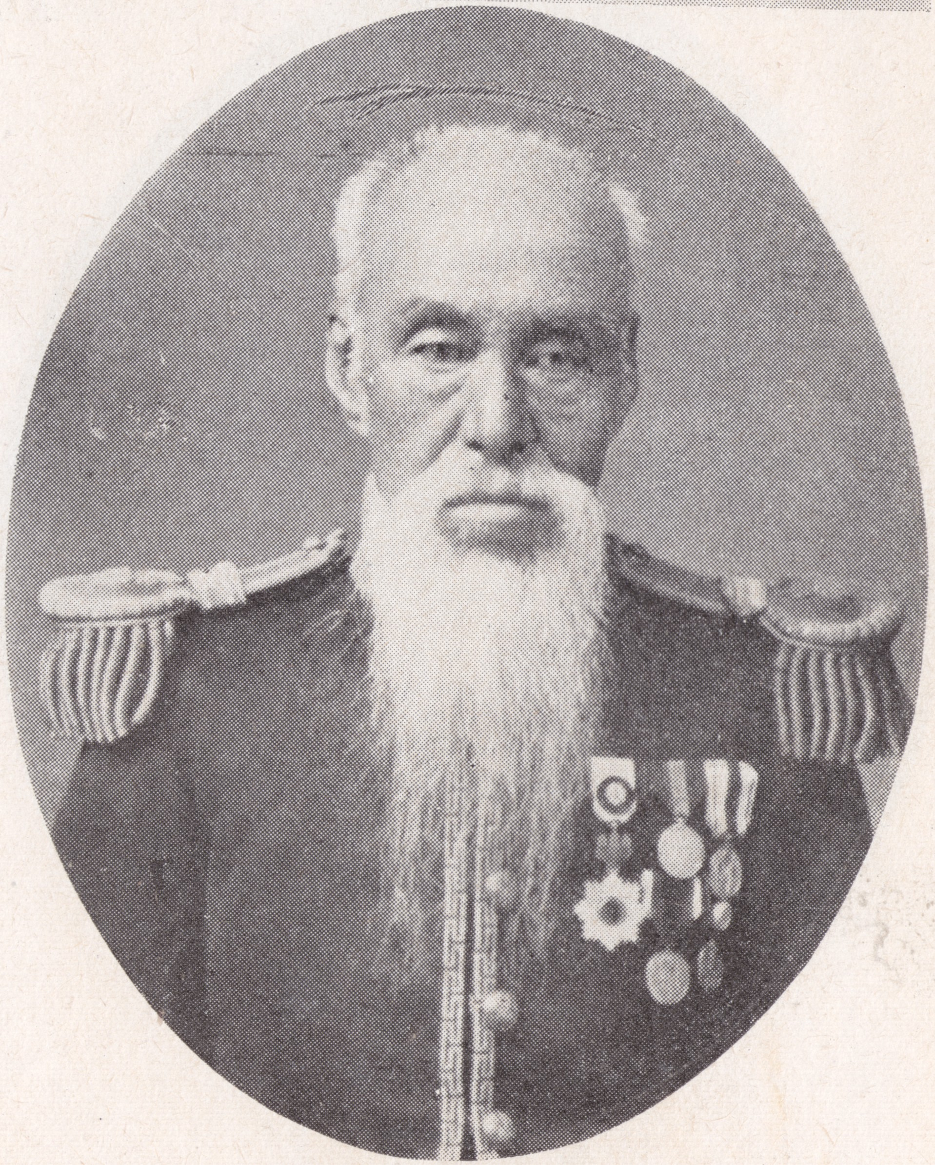 男爵金子有卿